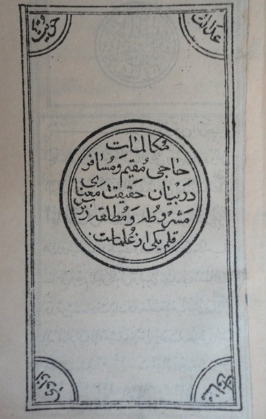 چاپ سنگی رساله مقیم و مسافر در خانه مشروطه اصفهان